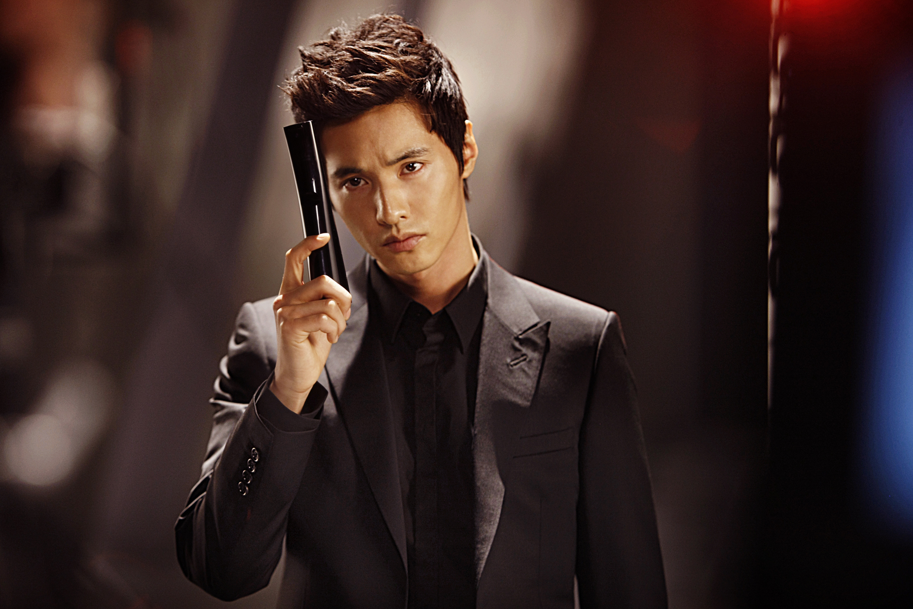 LG전자, 스마트TV 모델로 한류 톱스타 원빈 선정